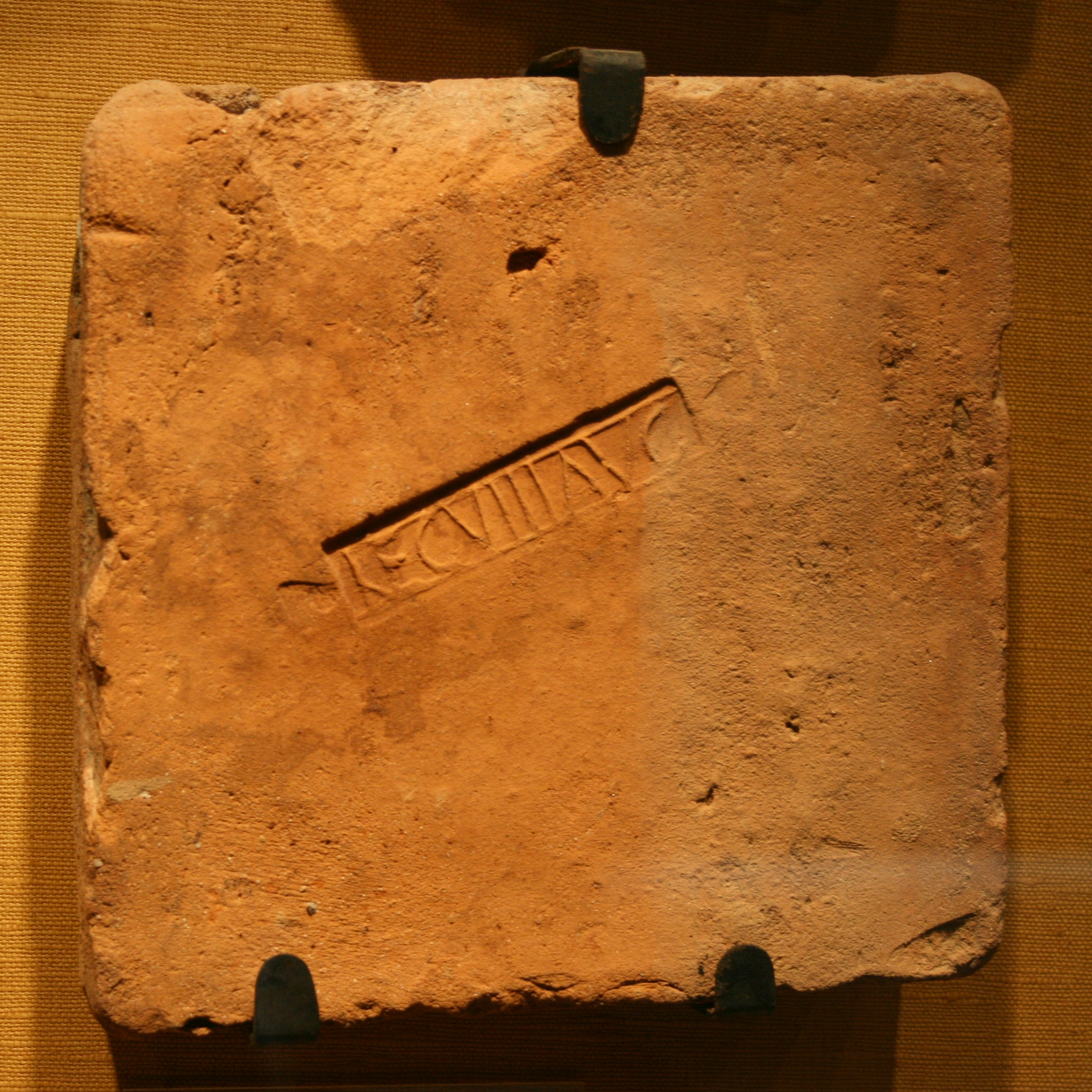 Ziegelstempel der Legio VIII Augusta, ausgestellt im Saalburgmuseum, Bad Homburg v.d.H. Mit freundl. Genehmigung.